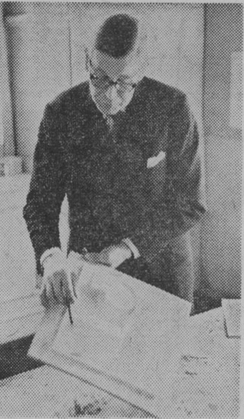 Hans Brunnberg med förslag till kyrka i Västerås